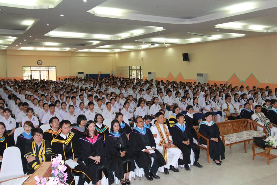 พิธีปัจฉิมนิเทศและจบหลักสูตร ปีการศึกษา 2560